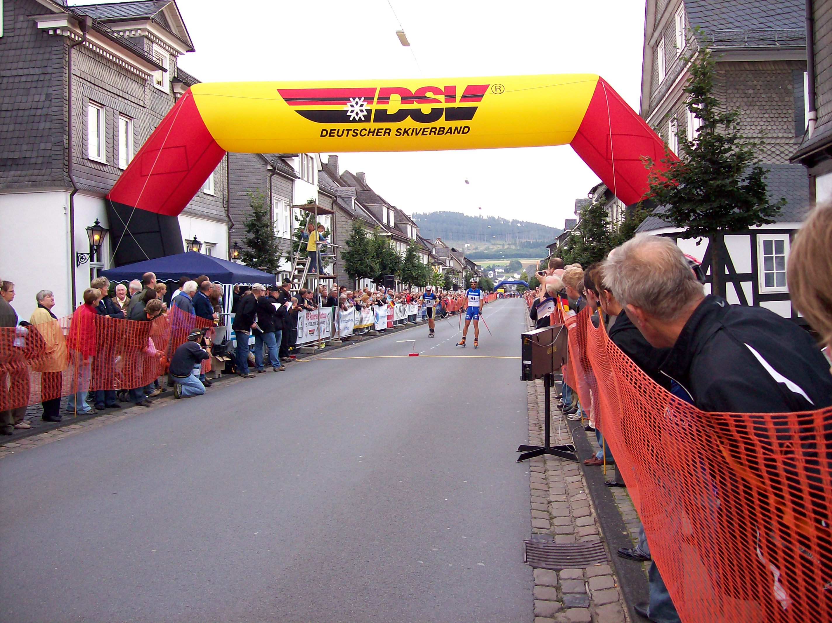 FIS Rollerski Weltcup 15. - 17. August 2008 in Schmallenberg (Germany)